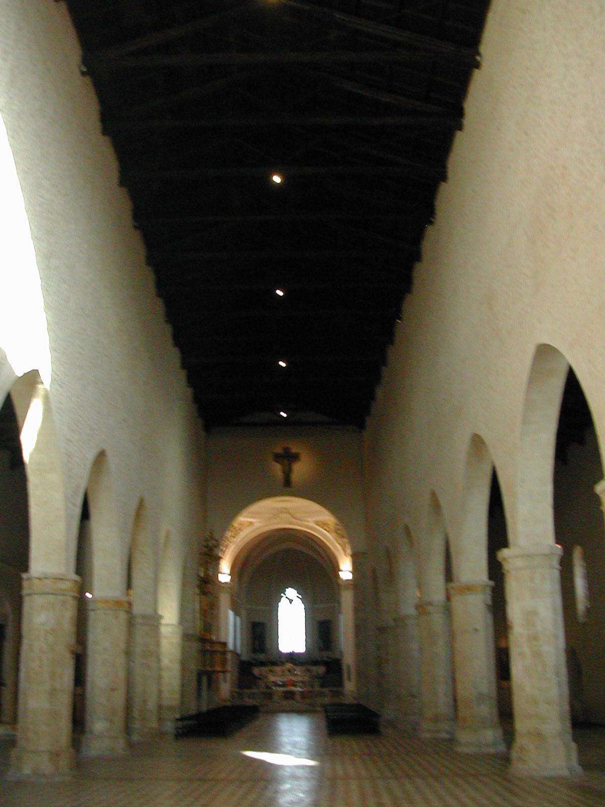 l'Aquila Basilica di Santa Maria di Colle Maggio